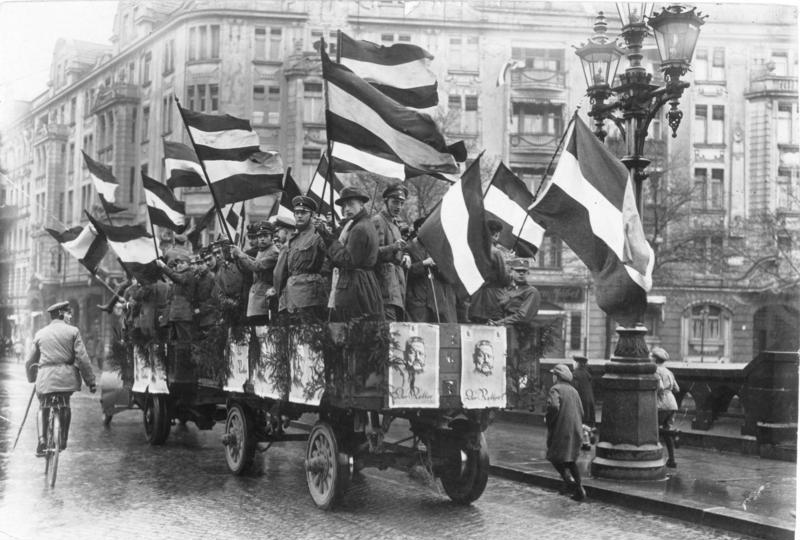 Berlin, Wahlpropaganda für Hindenburg ADN-ZB-Archiv Berlin 1925: Wahlpropaganda für Paul von Hindenburg zum 2. Wahlgang der Reichspräsidentenwahl am 26.4.1925 [Scherl Bilderdienst]